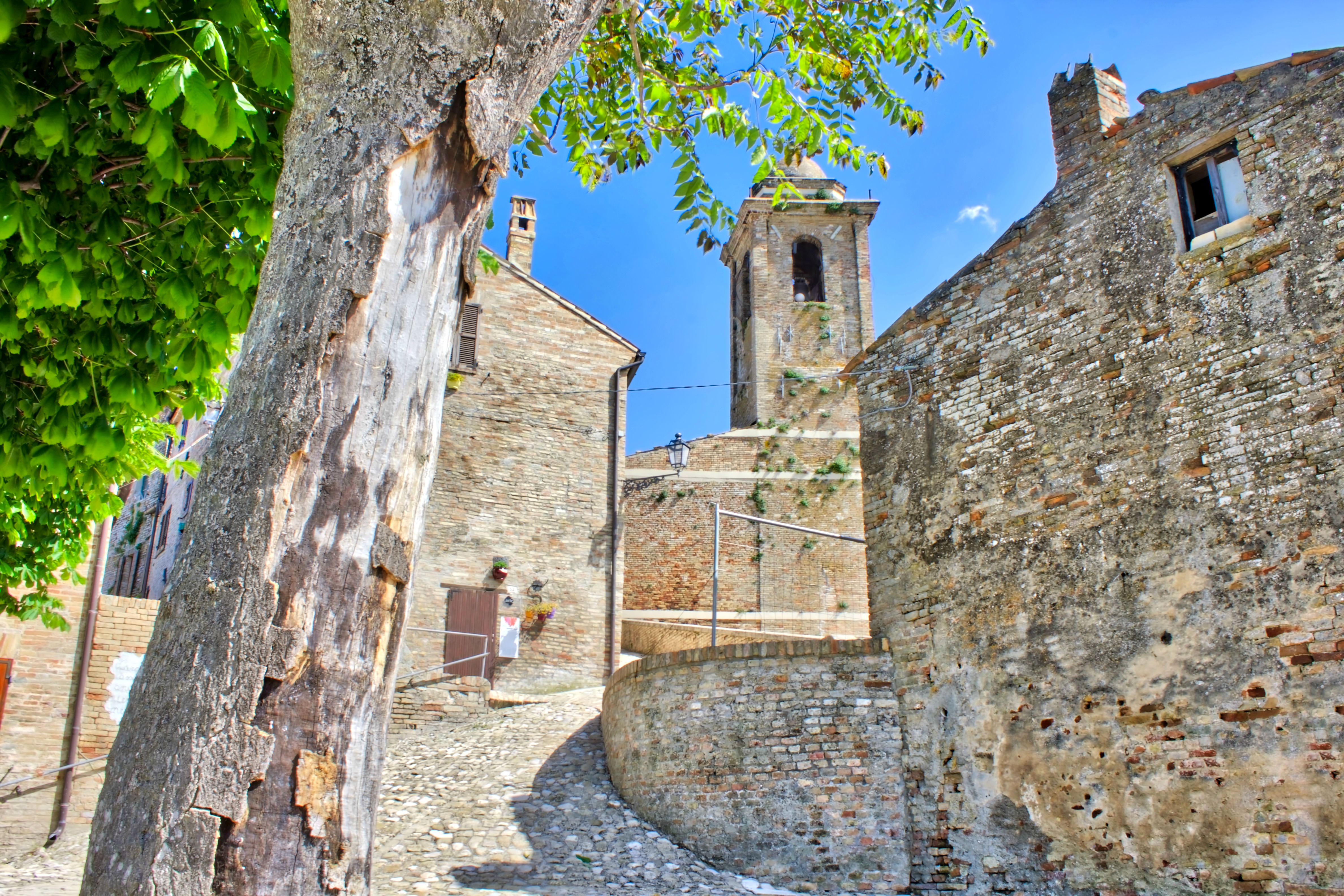 Il castello vecchio è il nucleo più antico di Carassai che nel tempo è andato a costituire la Cittadella del Castello Nuovo.